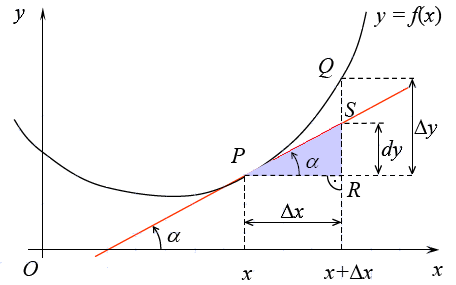 Funktsiooni diferentsiaal